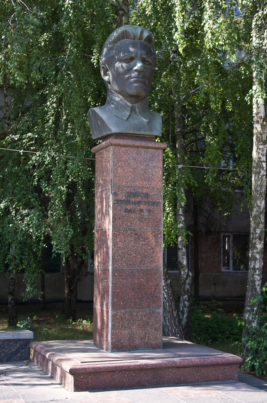 Памятник установлен перед заводом Литмаш в Тирасполе